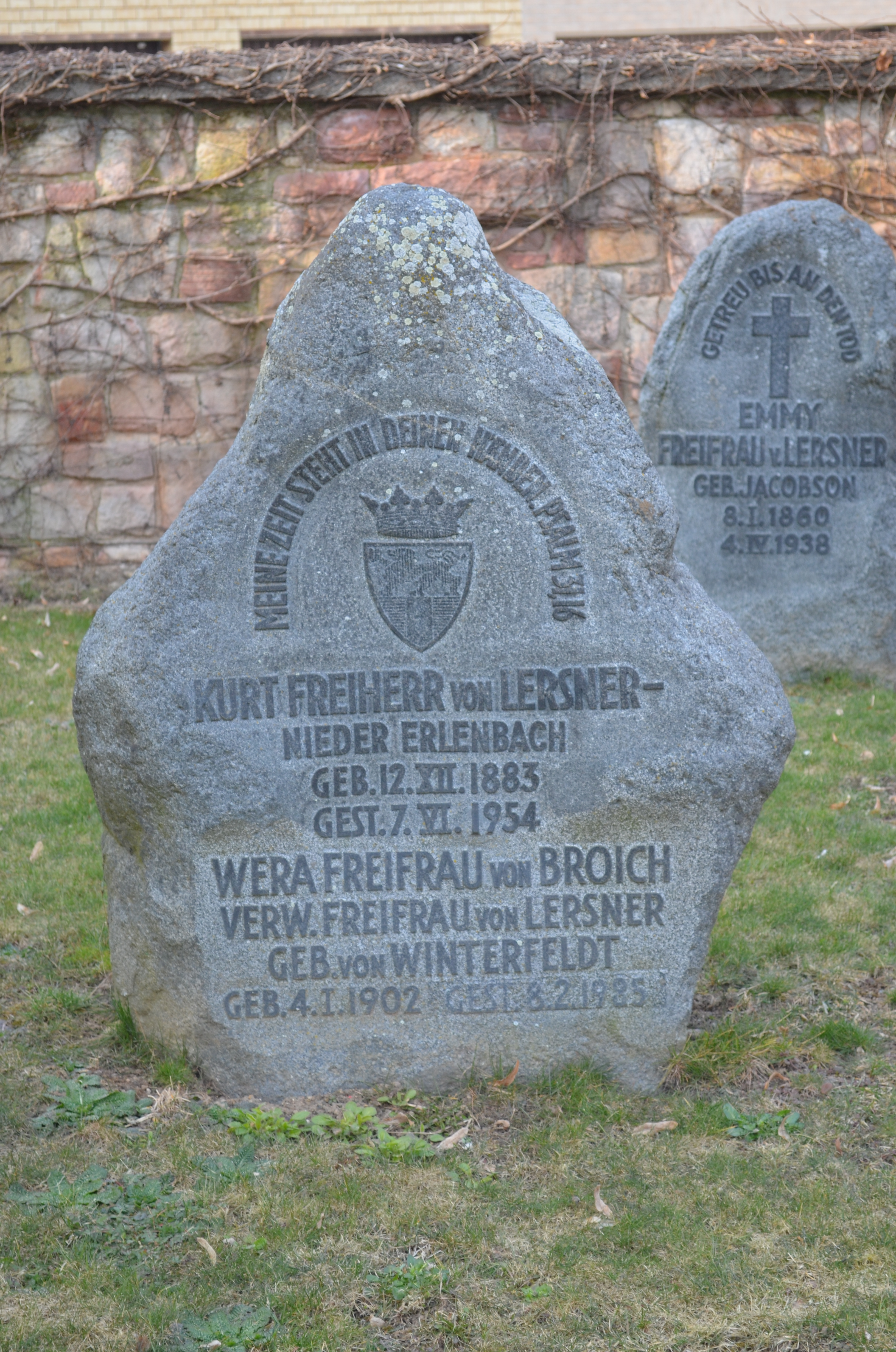 Nieder-Erlenbach, Lersner-Gräber, Kurt von Lersner